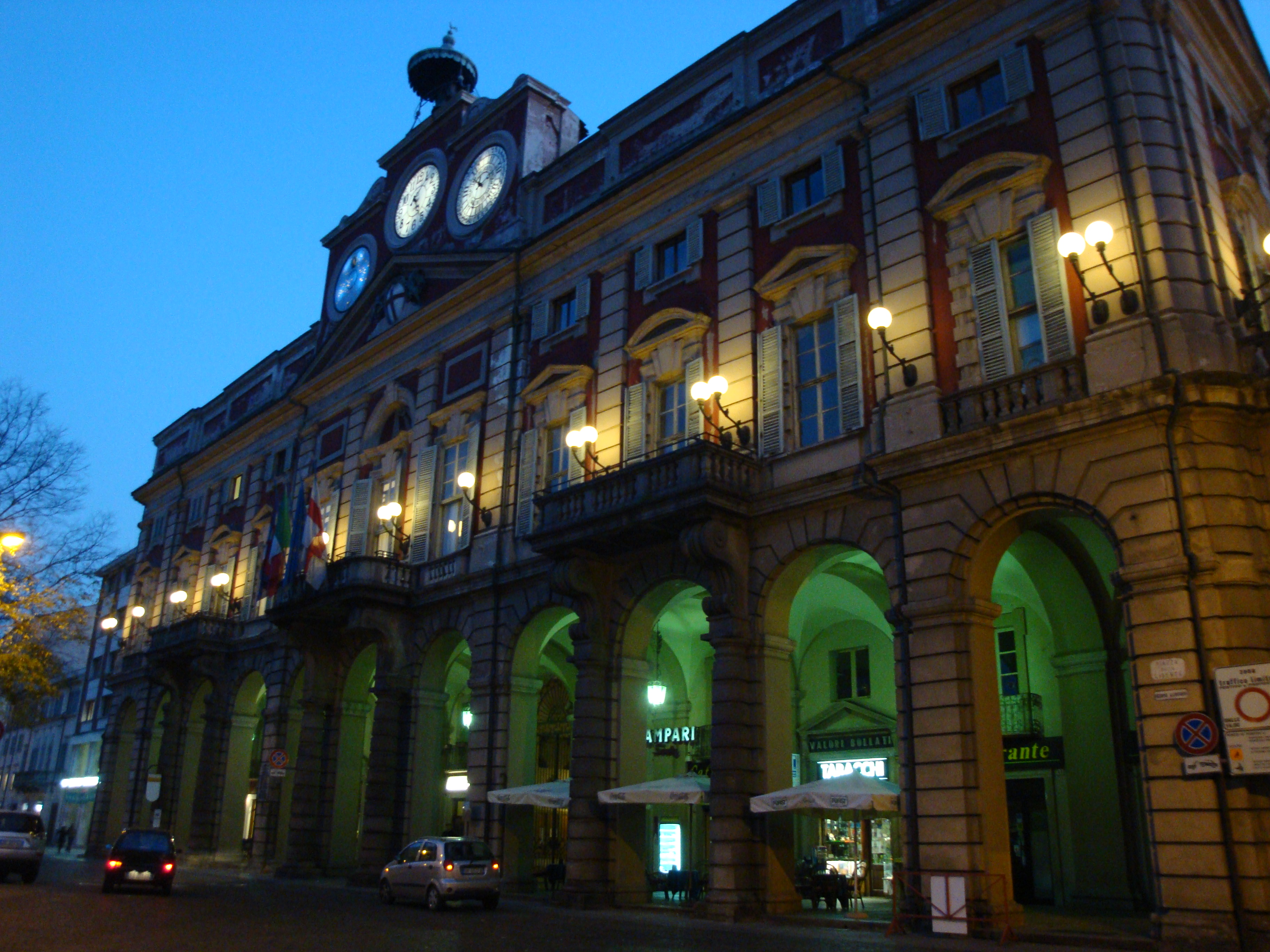 Municipio di Alessandria di sera